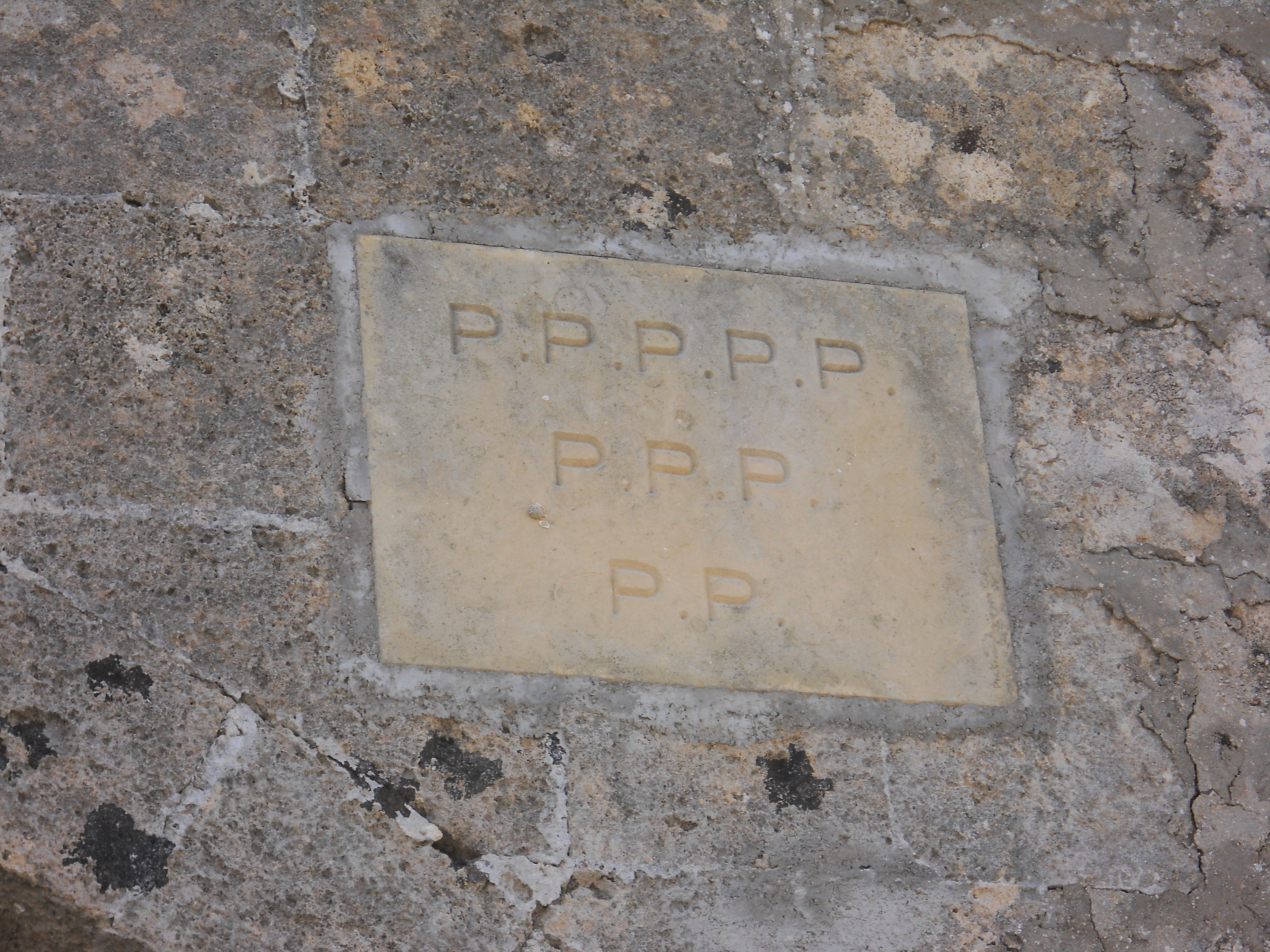 Particolare della Locanda presso il santuario "Leuca Piccola" - Barbarano del Capo (10P)